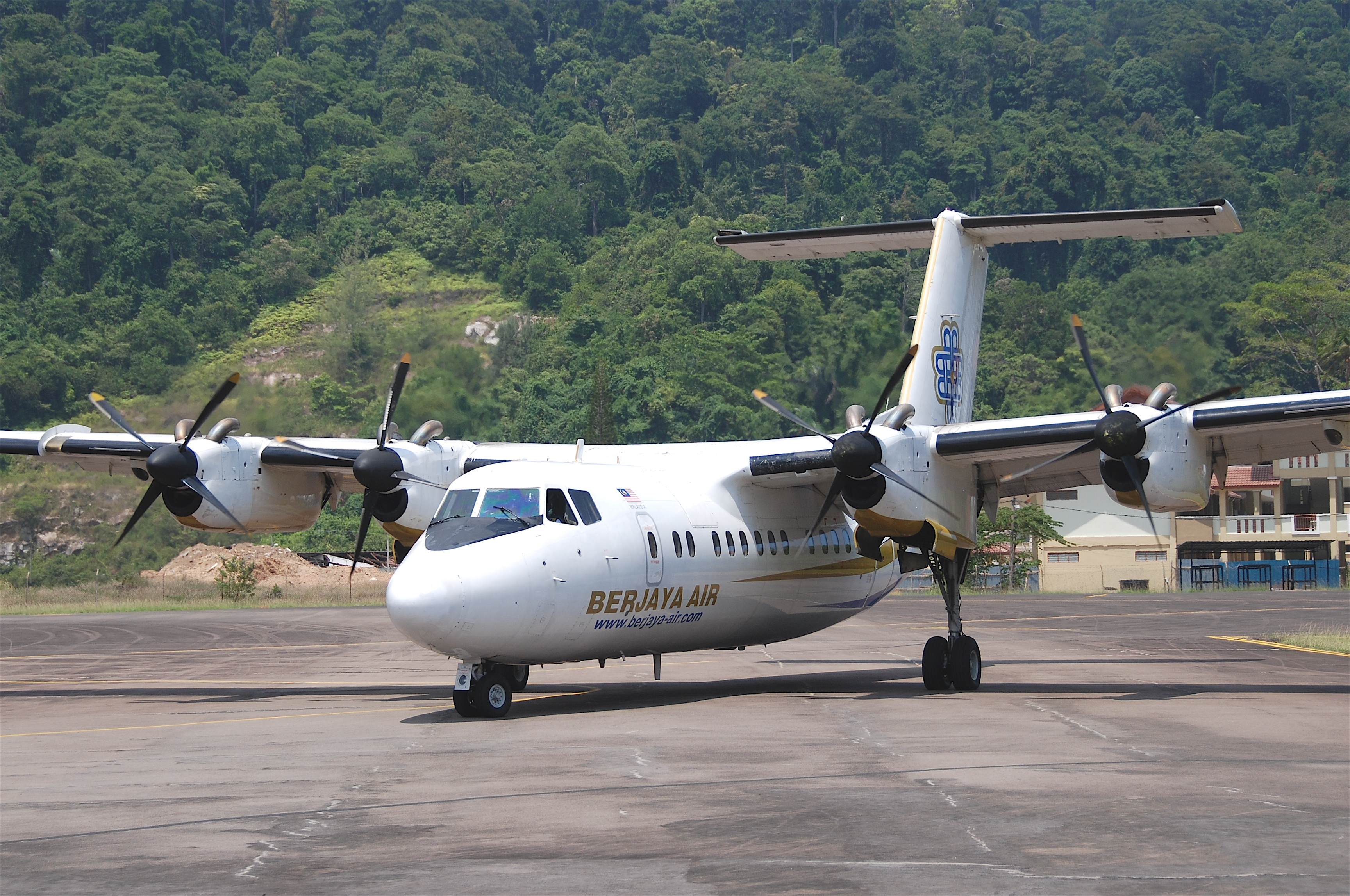 Berjaya Air DHC-7-110 Dash 7; 9M-TAK@TOD;12.08.2011/618al